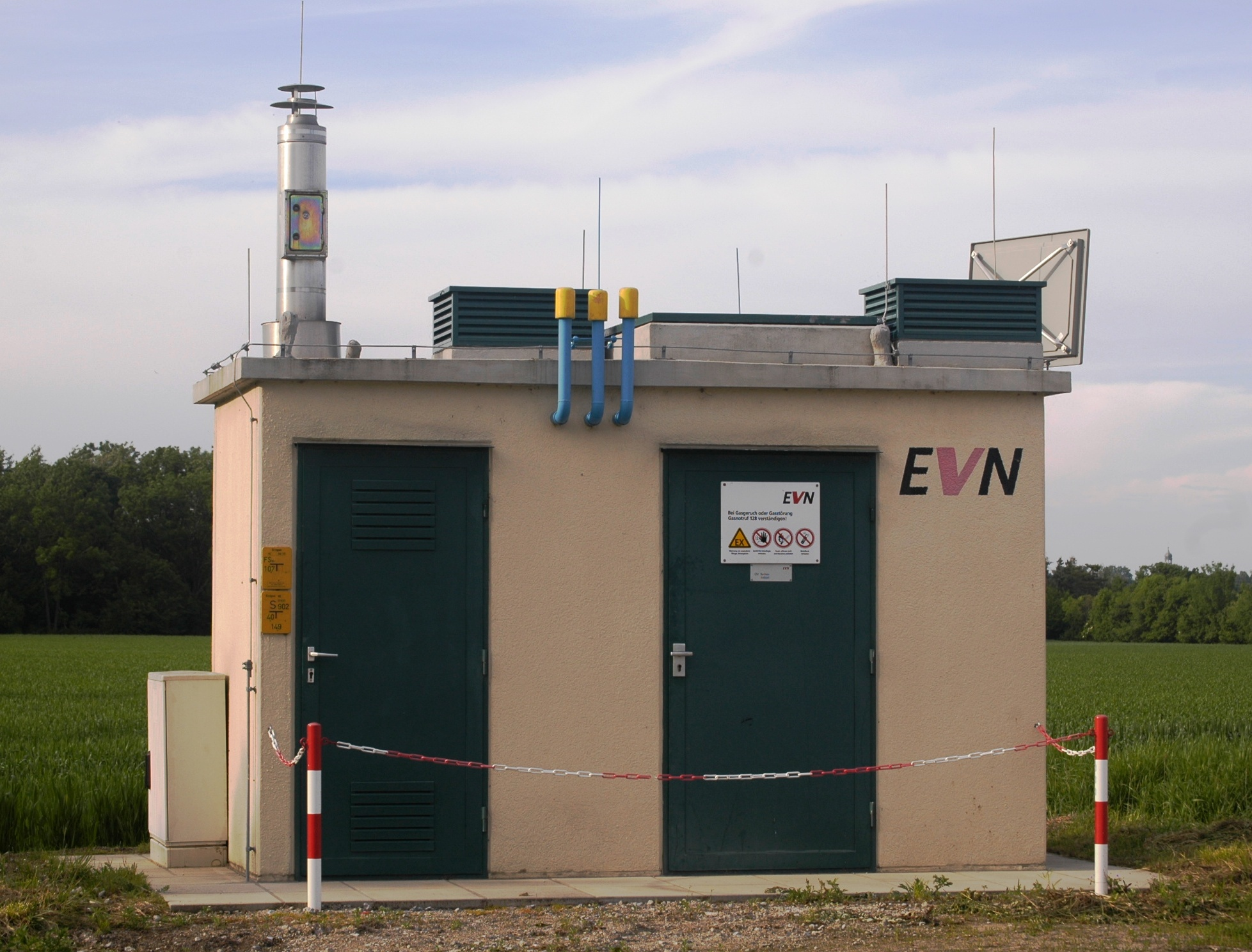 Gasdruckregelstation, welche den Druck des Erdgases aus der Hochdruckleitung auf Mitteldruck reduziert. Links der Kamin vom Gaskessel, der die Wärme für die Vorwärmung erzeugt.